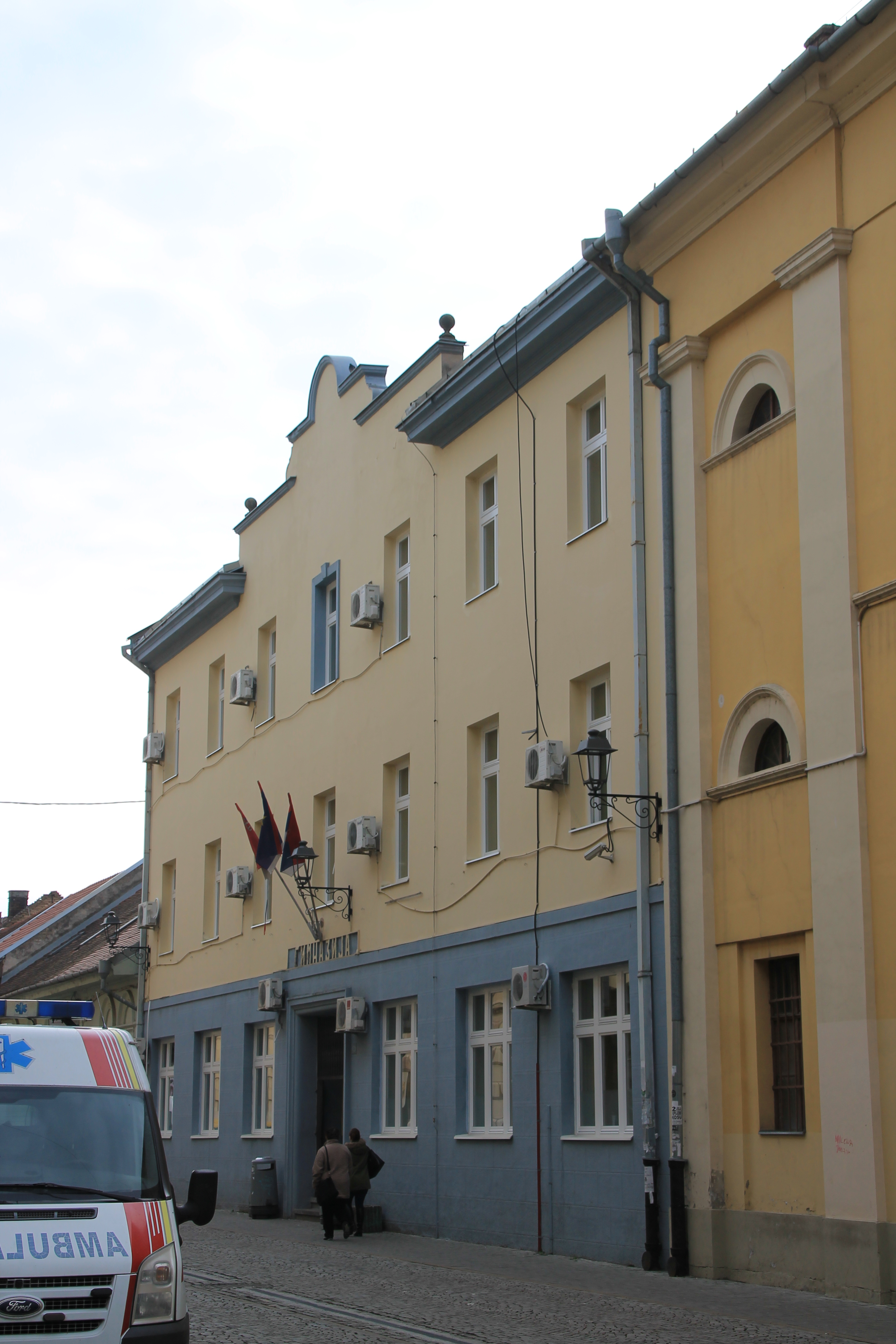 Staro jezgro Zrenjanina